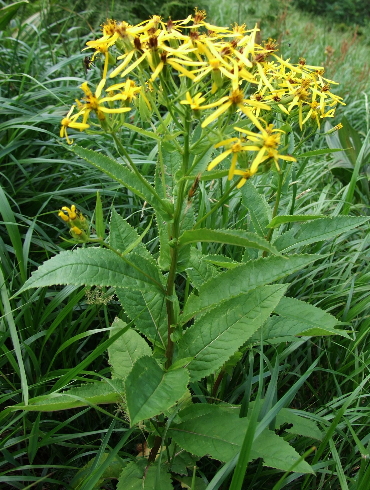 Senecio nemorensis subsp. fuchsii (pl. starzec Fuchsa), habitat: Spalona Dolina, West Tatra Mountains